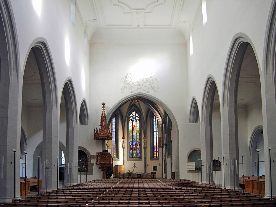 Inneres der Kirche St. Johann in Schaffhausen